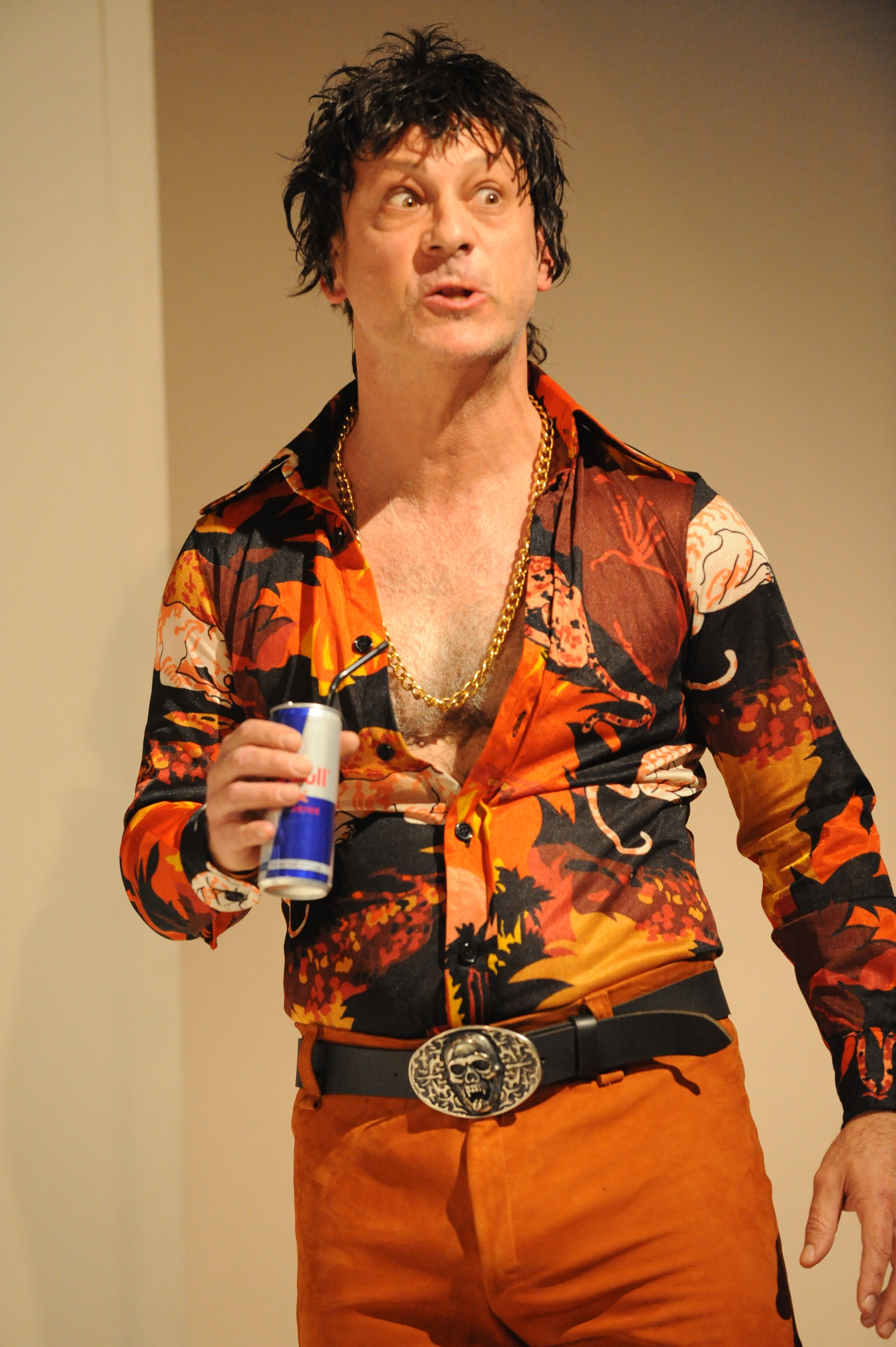 ארז שפריר בהצגה תעלולי סקפן